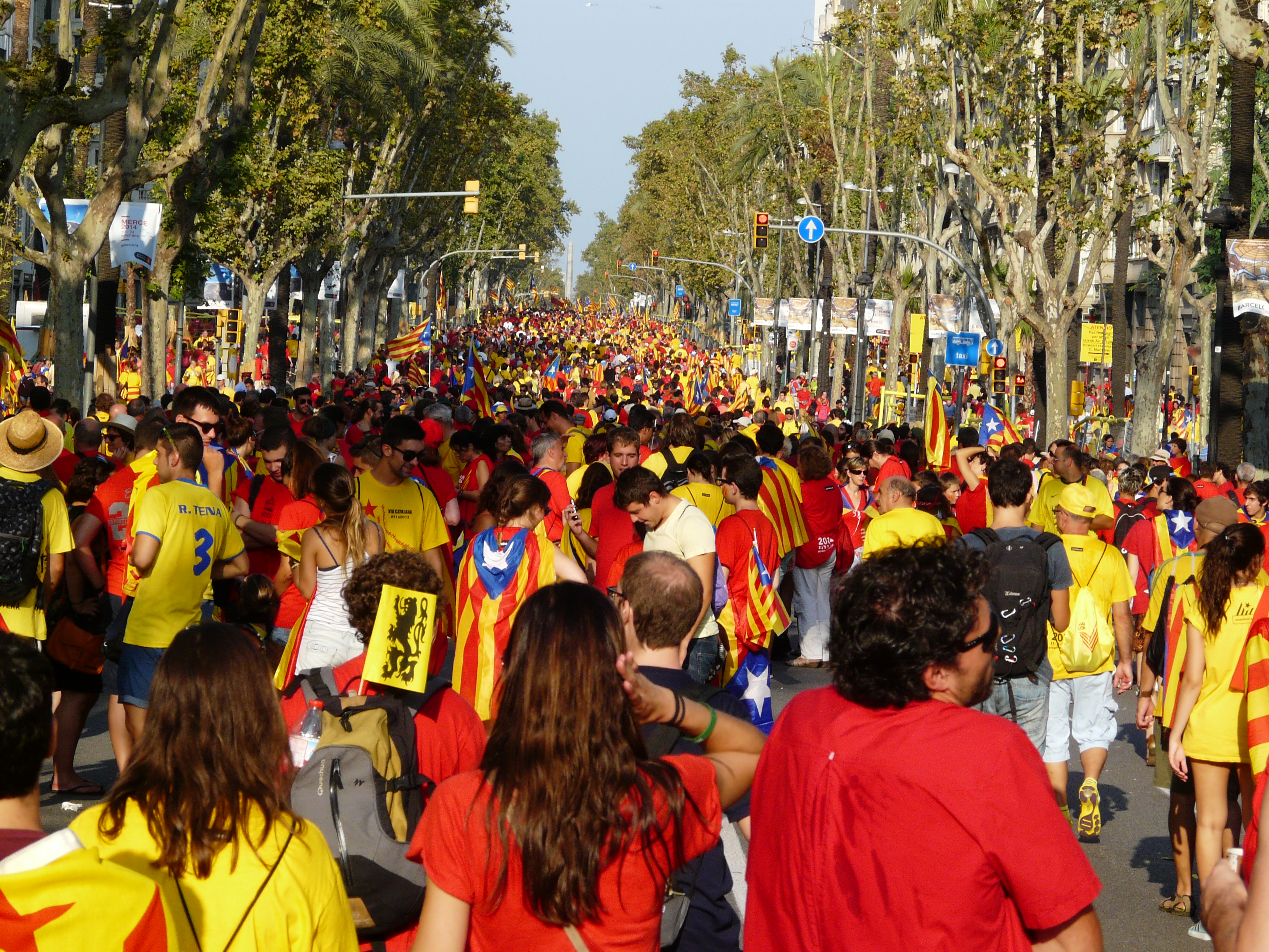 V Catalana, branca de la Diagonal.